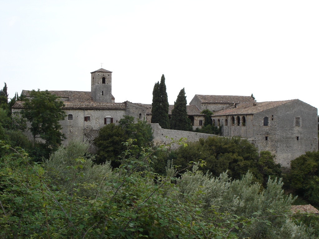 Questa foto è stata scattata da me. Ne autorizzo il libero uso su Wikipedia